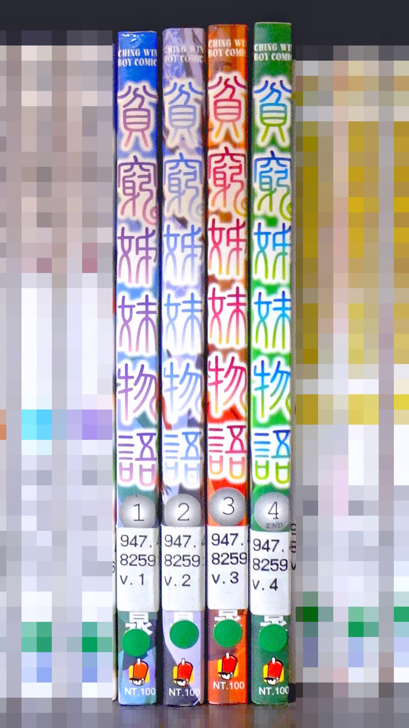 中文（台灣）: 中華民國國家圖書館藝術暨視聽資料中心漫畫屋收藏的青文出版社《貧窮姊妹物語》臺灣中文版全套單行本書背。